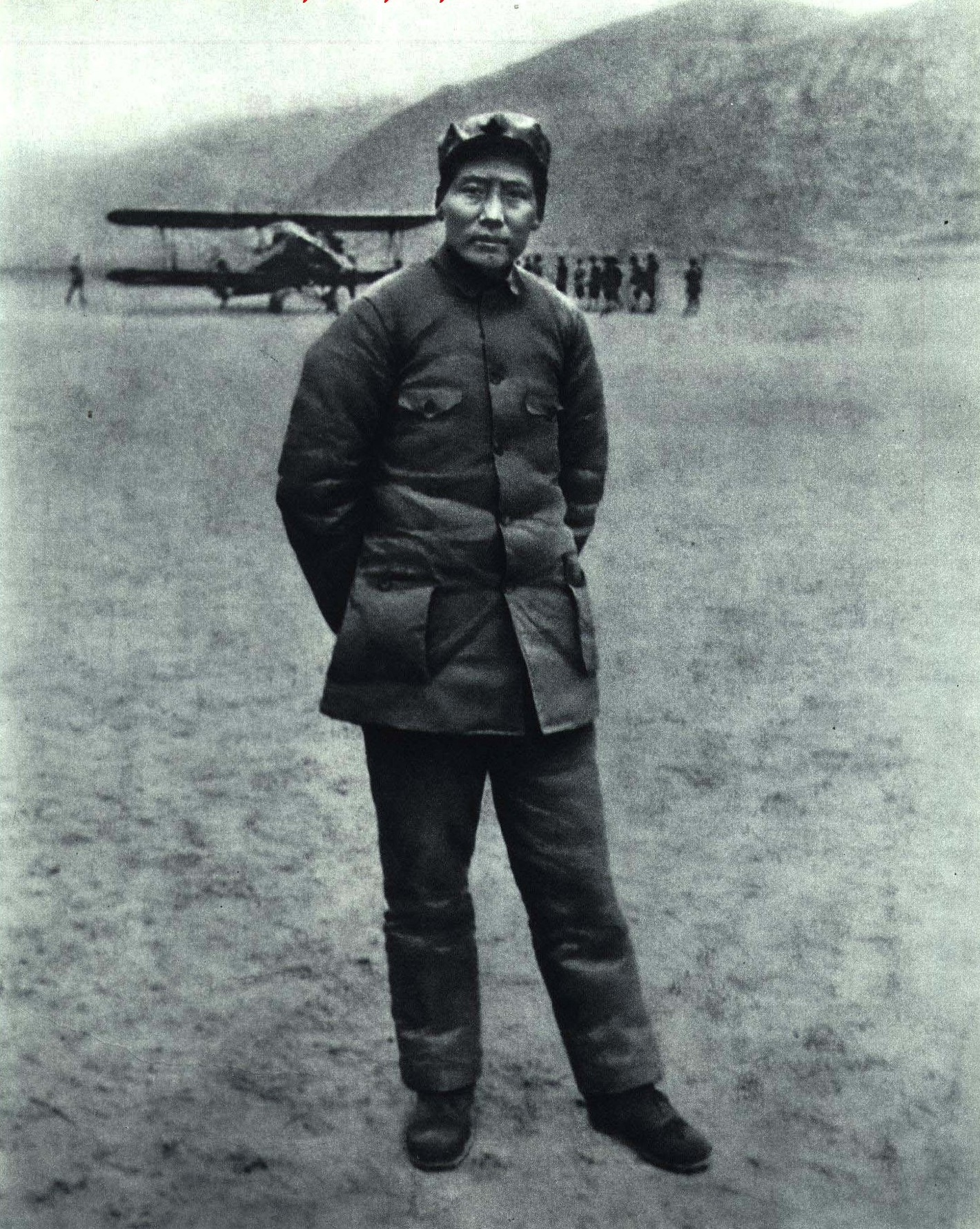 1967-10 1936年毛泽东在陕北